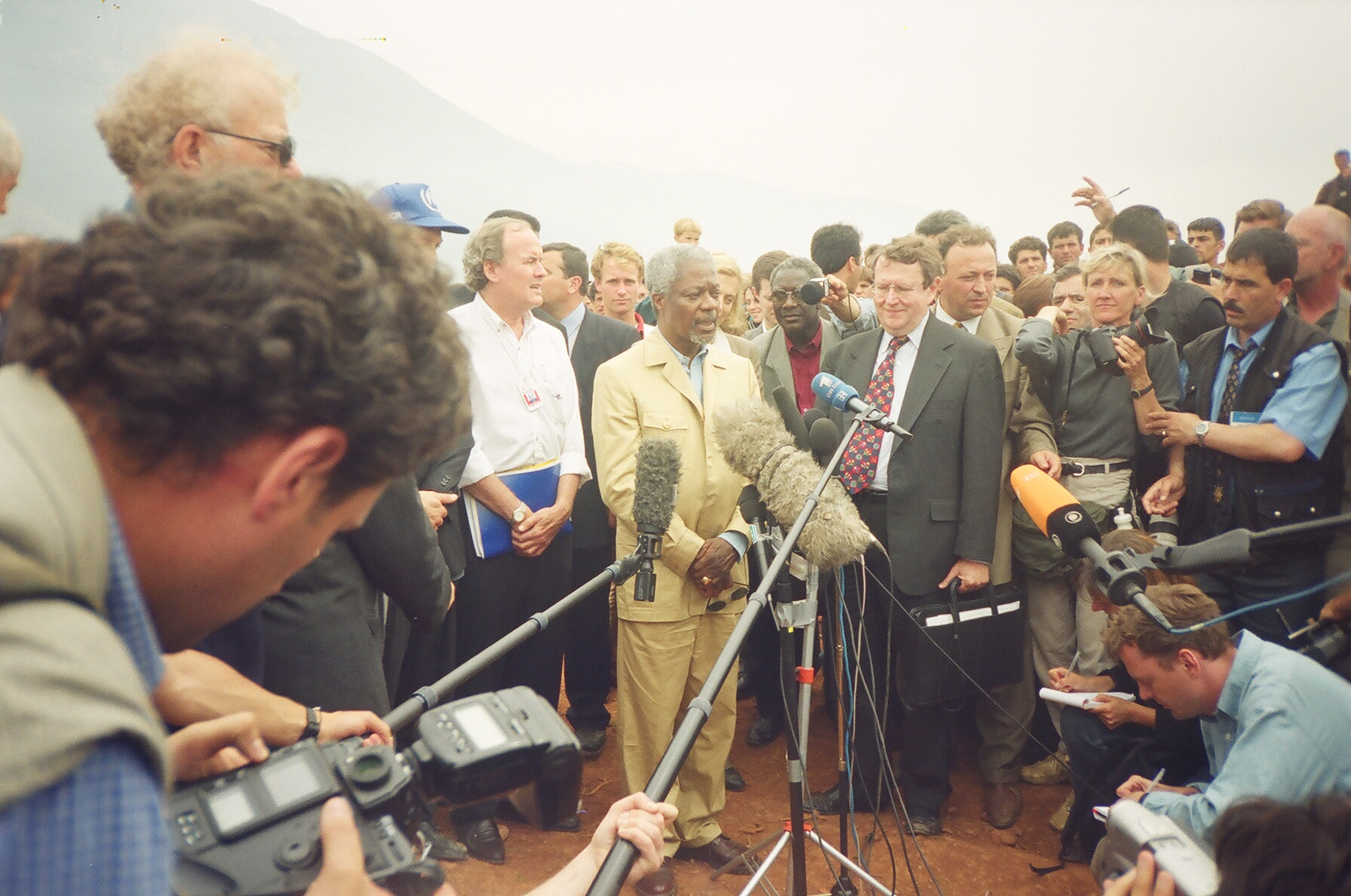 Kofi Anan - Shefi i OK ne Kukes gjate Krizes Kosoves 1999